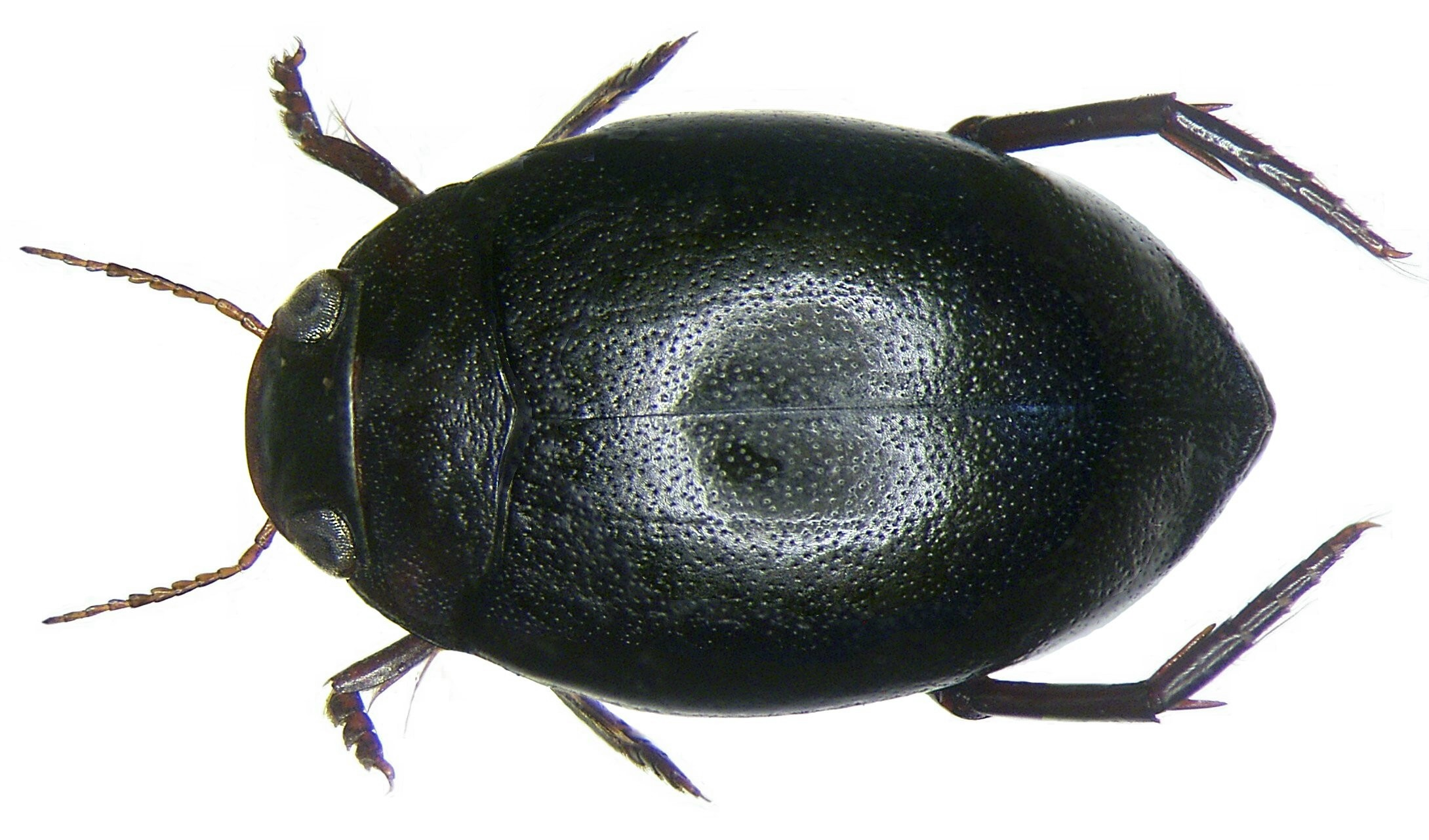 Heterhydrus agaboides Fairmaire, 1869 Familie: Dytiscidae Größe: 6 mm Fundort: Madacascar, Andasibe-Mantadia, Lokato leg. M.Tryzna, 2007; det. A.Skale Foto: U.Schmidt, 2008